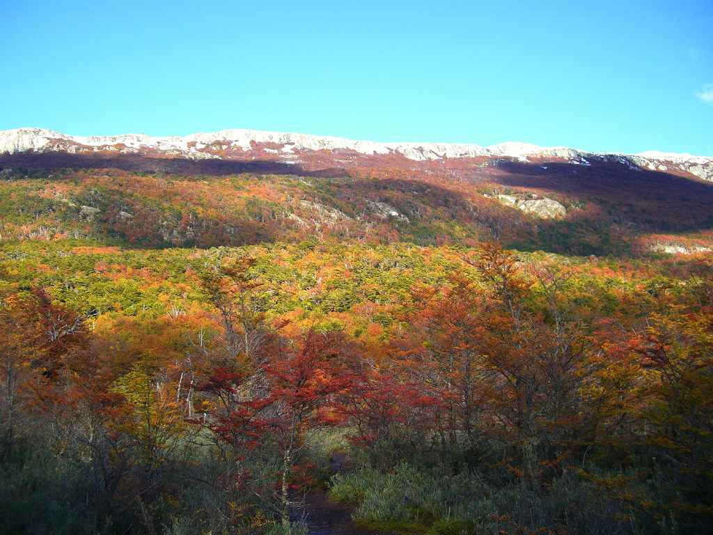 Parc National Tierra del Fuego, Ushuaia, en automne